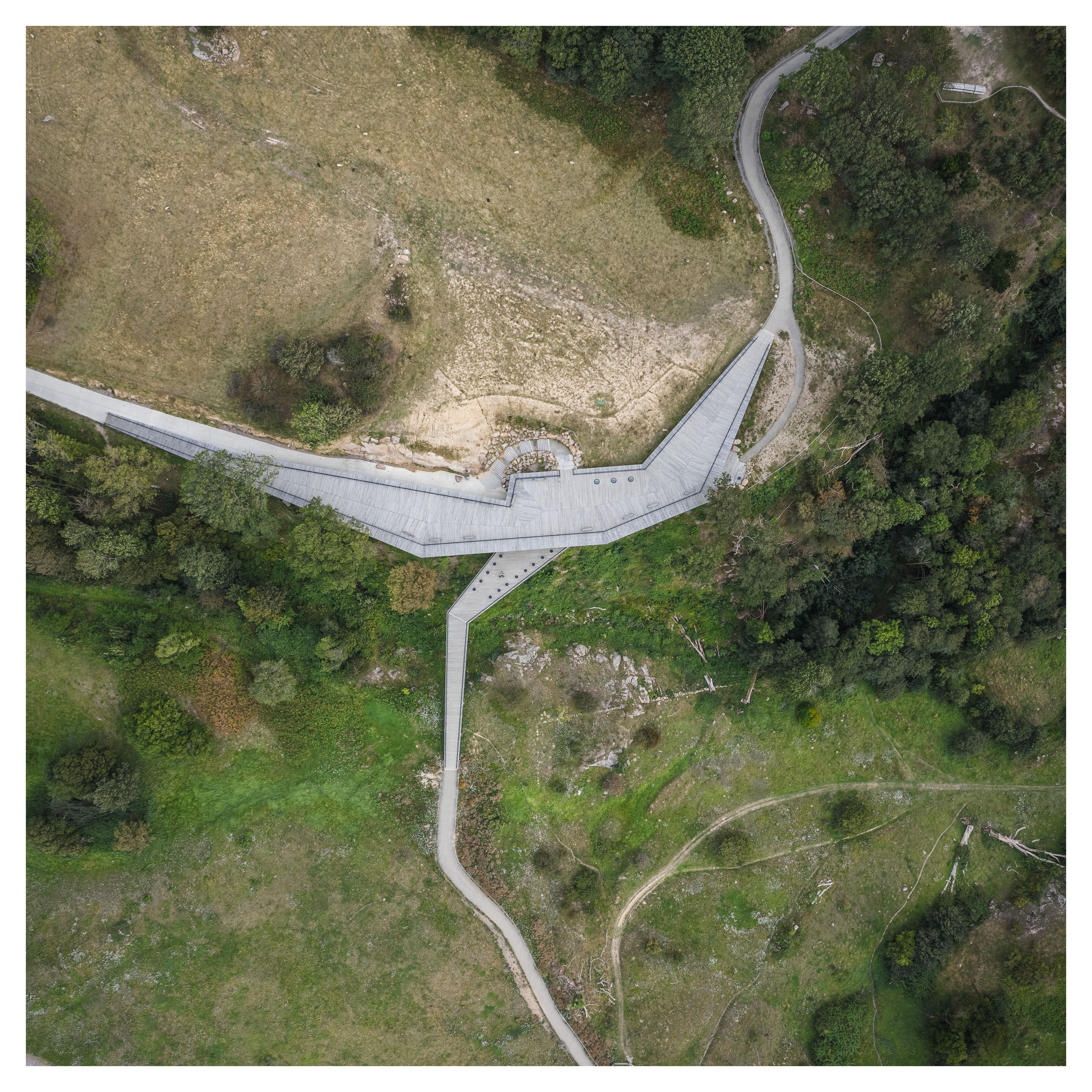 Hammerhus Besøgscenter Christoffer Harlang Architects